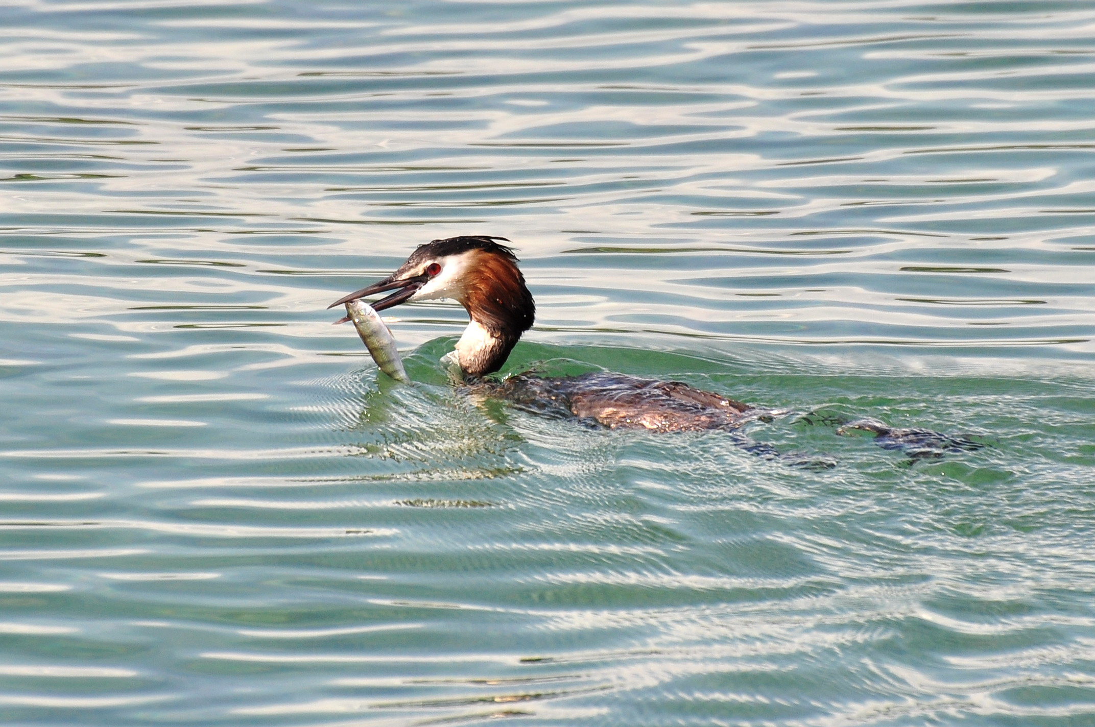 Podiceps cristatus on Obersee (upper Lake Zürich) respectively Seedamm and the wooden bridge (Holzbrücke) between Hurden and Rapperswil in Switzerland